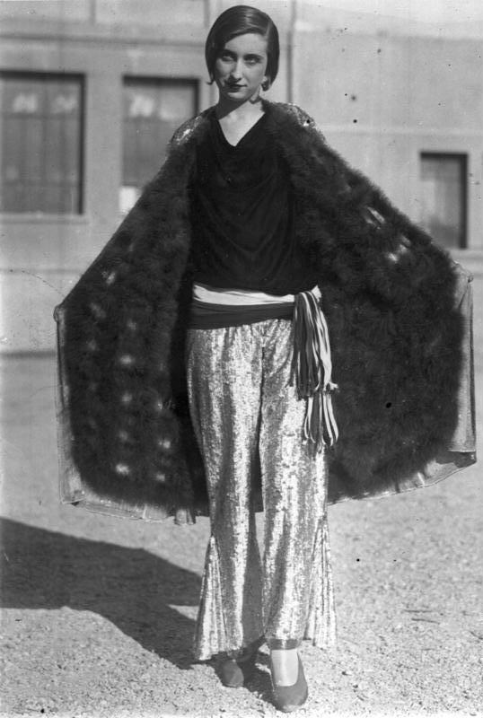 Neueste Pariser Modelle am Lido / Italien! Eine grosse Modenschau am Lido / Italien zeigte die neuesten Pariser Modelle. Strandanzug mit Sommerpelz.